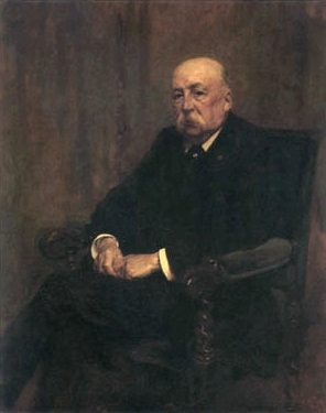 Portrait de Théophile de Lantsheere (1907). Gouverneur de la Banque nationale de Belgique Collections de la Banque nationale de Belgique